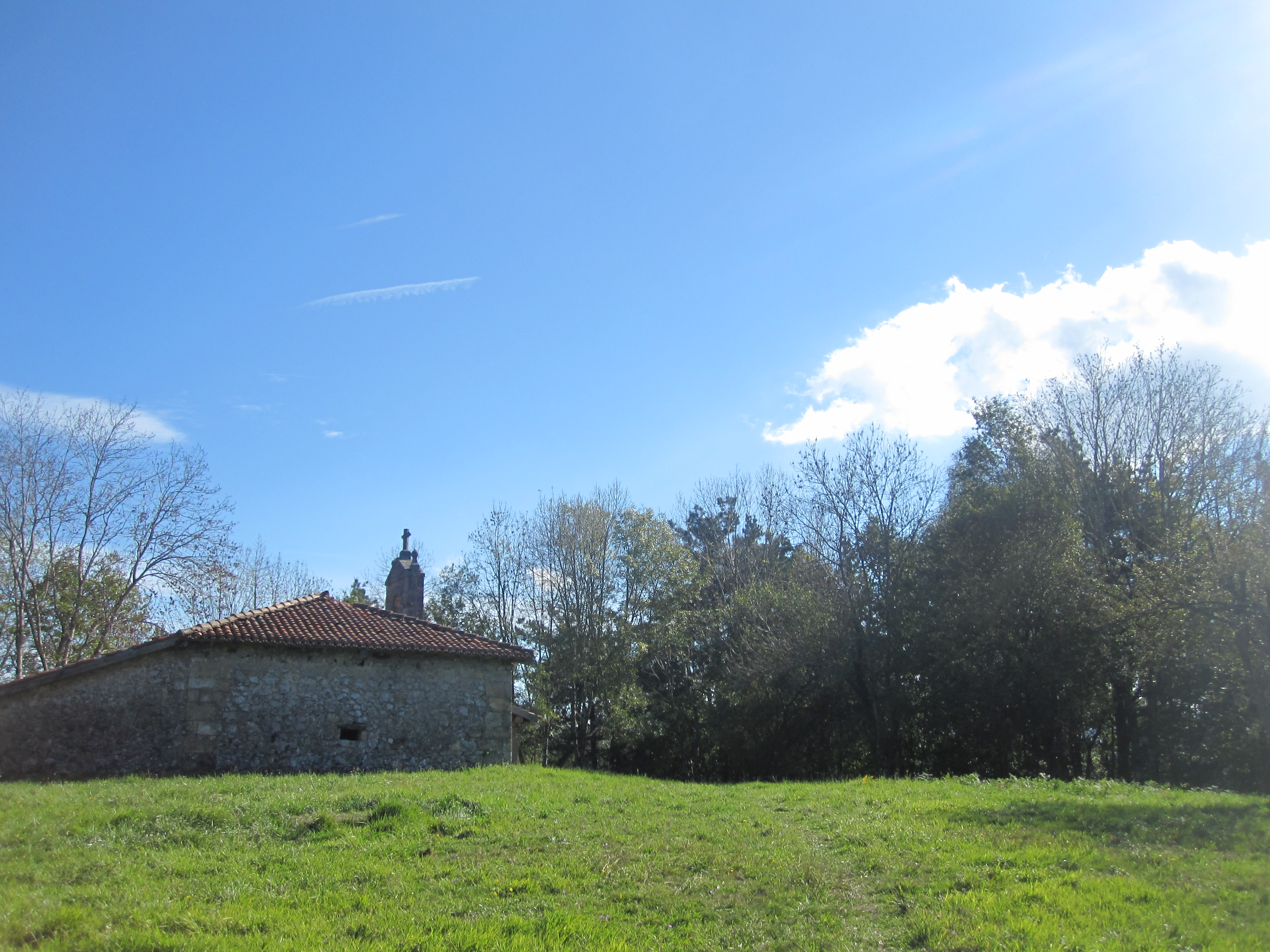 Iurretako mendia